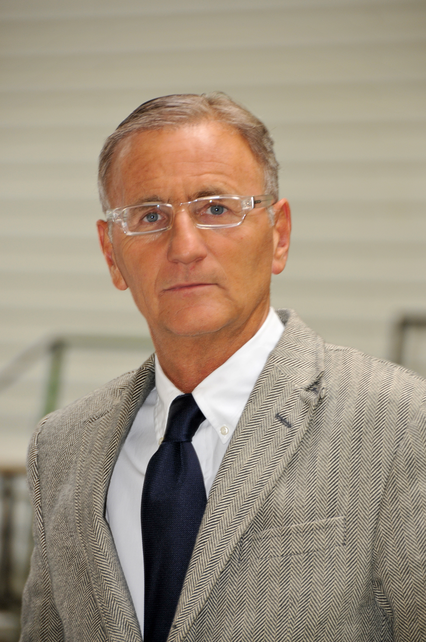 André Vallini, Sénateur et Président du Conseil général de l'Isère